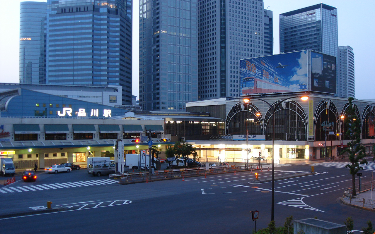 早朝の品川駅高輪口